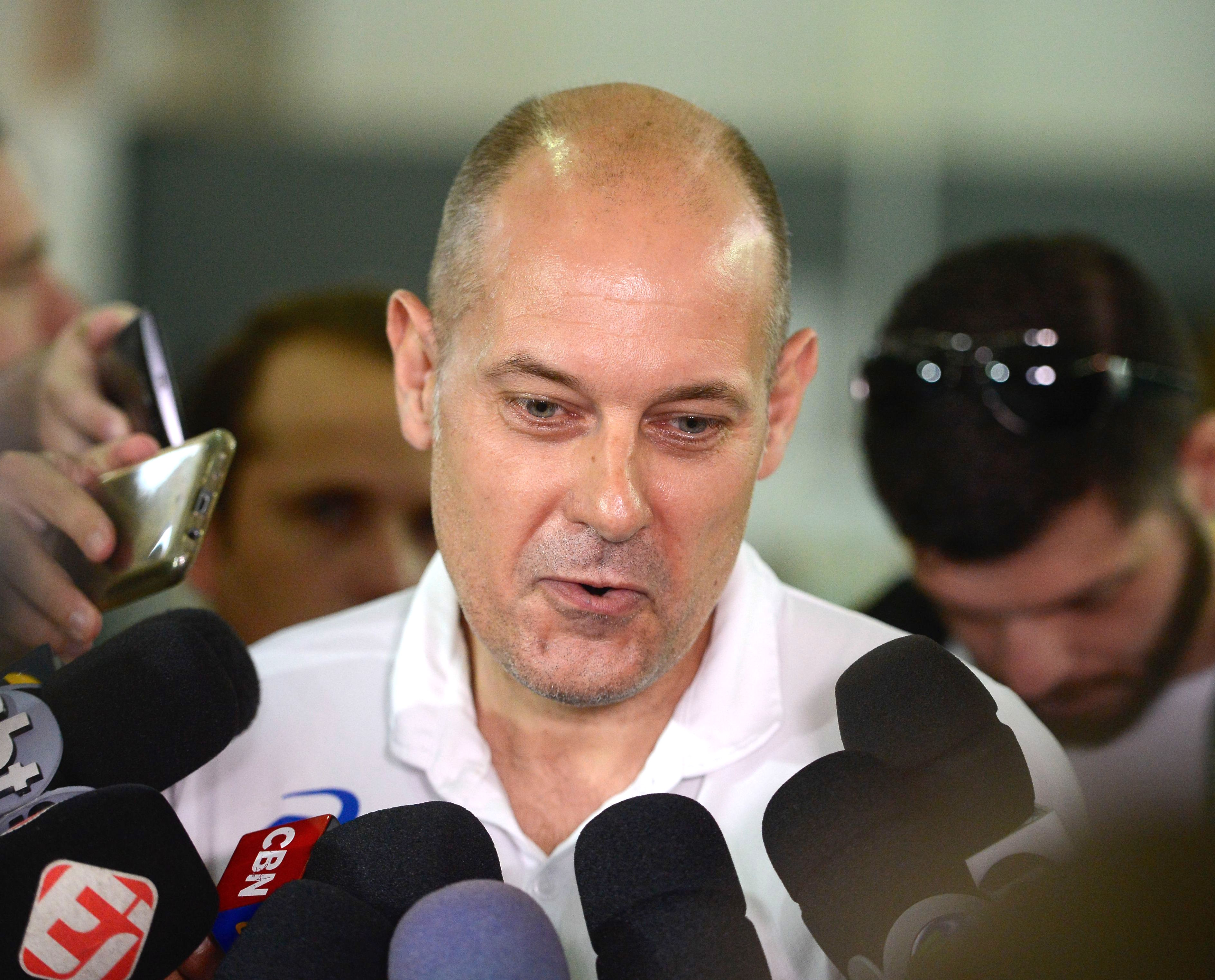 Rio de Janeiro - O técnico da Seleção Feminina de Handebol, Morten Soubak, fala após treino aberto na Escola de Educação Física do Exército, na Urca, zona sul da capital (Tomaz Silva/Agência Brasil)